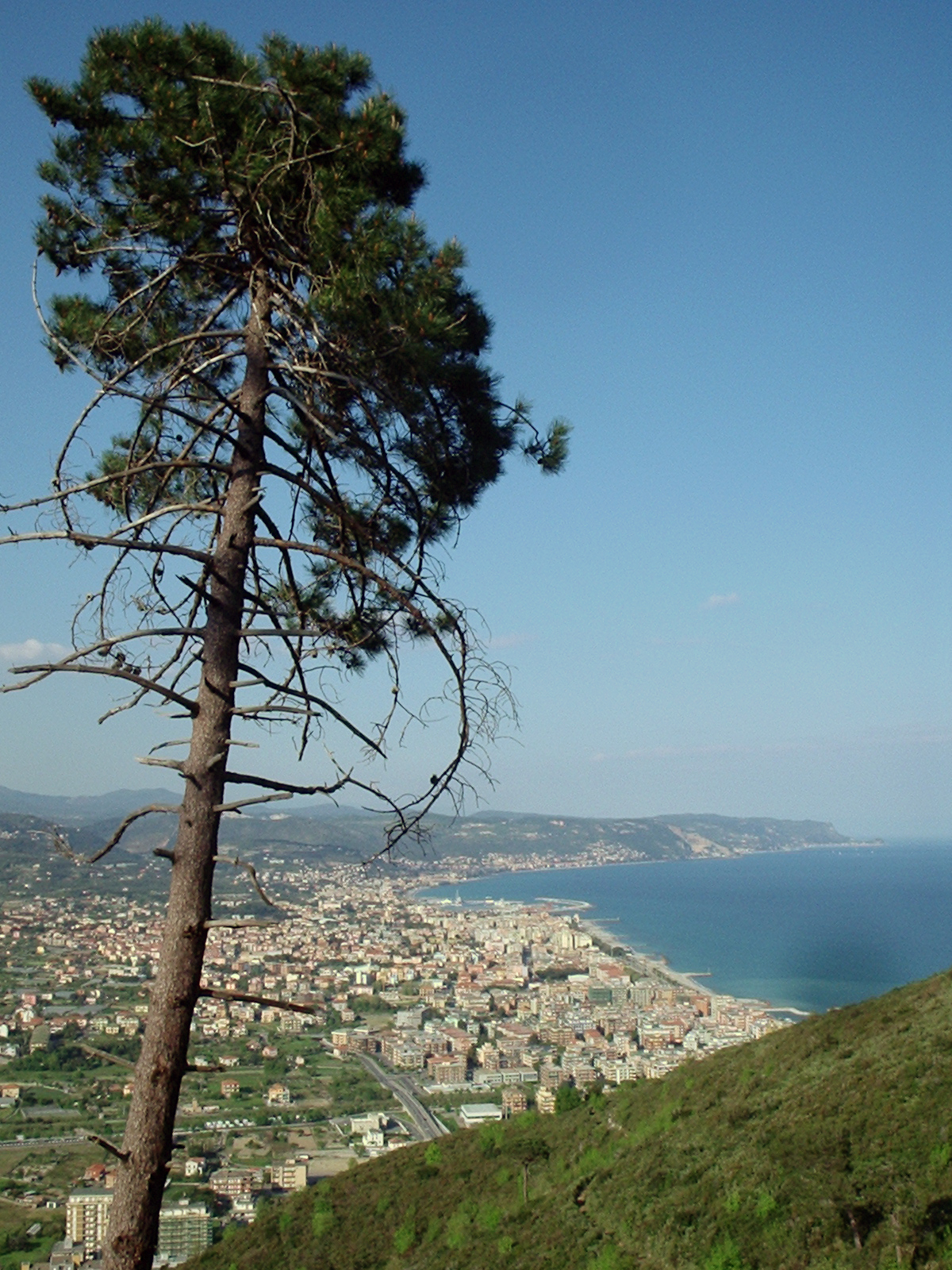 Pinus pinaster sopra Borghetto Santo Spirito